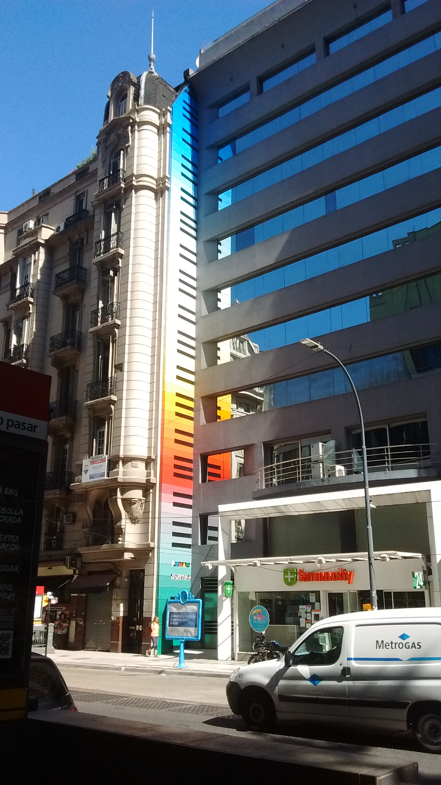 Mural "64 tonos de Buenos Aires", obra de Jorge Pomar, en Avenida Corrientes 1810, esquina con Callao. Buenos Aires, Argentina.